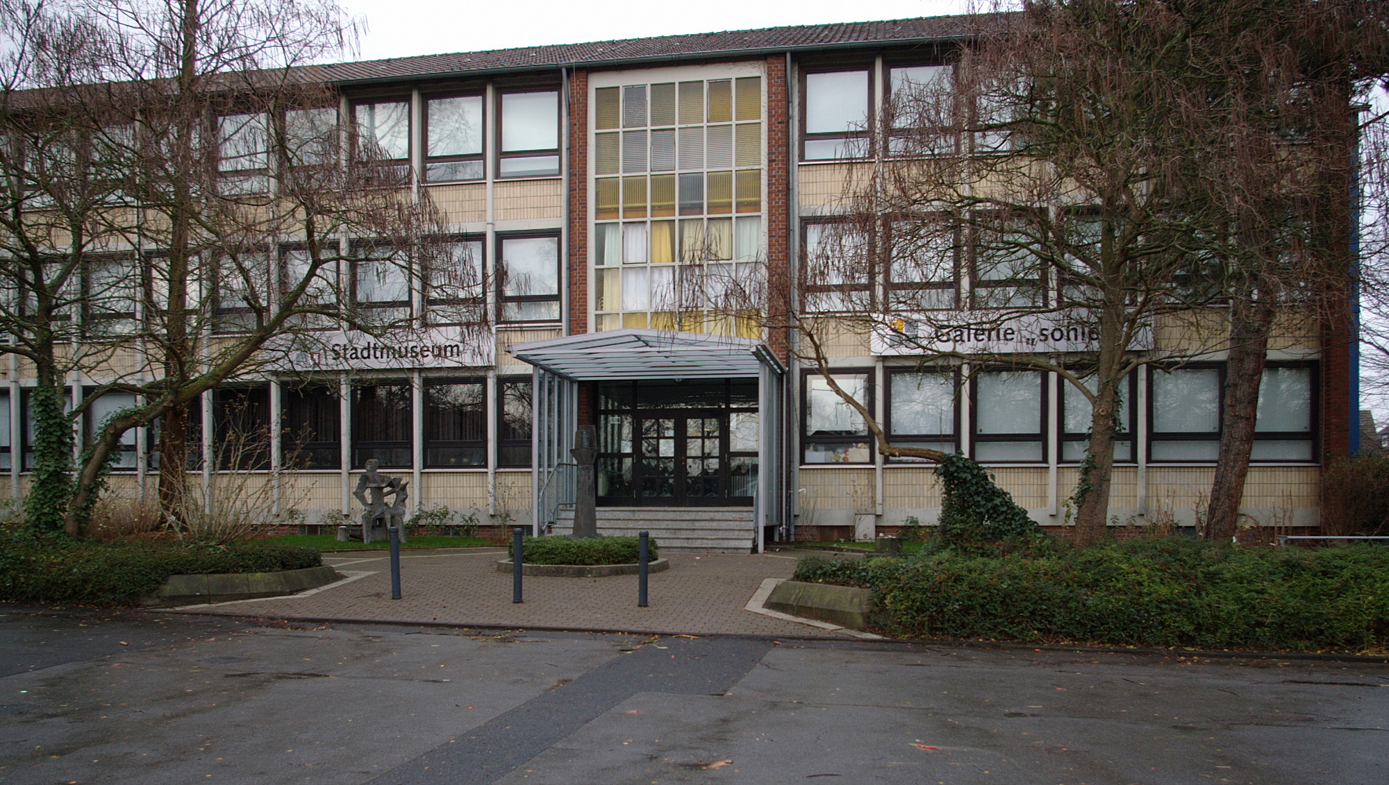 Stadtmuseum und Galerie "Sohle 1" in Bergkamen-Oberaden, Nordrhein-Westfalen